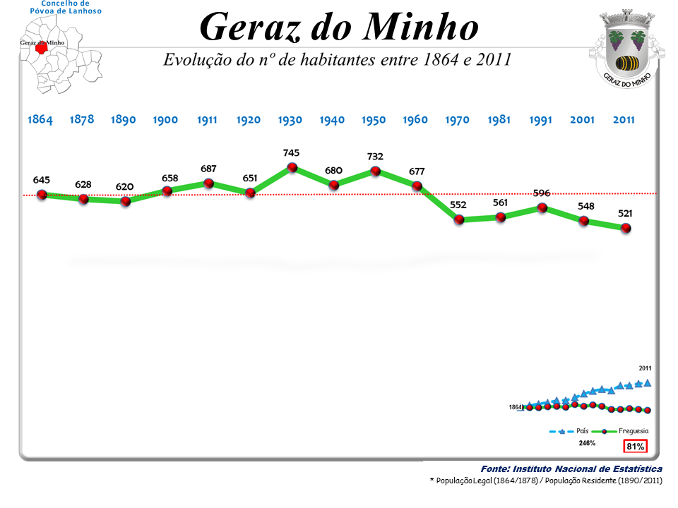 Censos 1864/2011